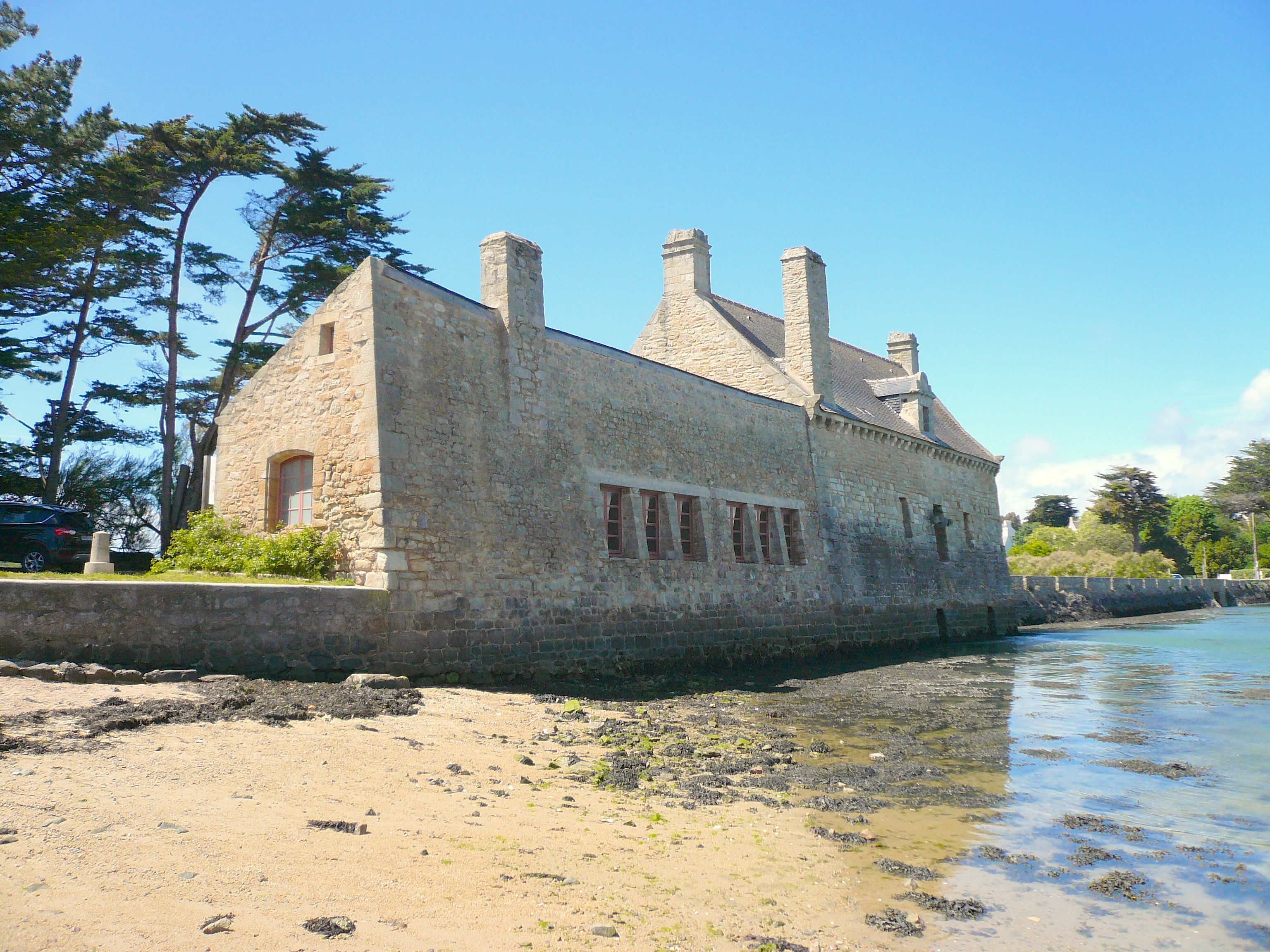 Le moulin de Pencastel à Arzon dans le Golfe du Morbihan.